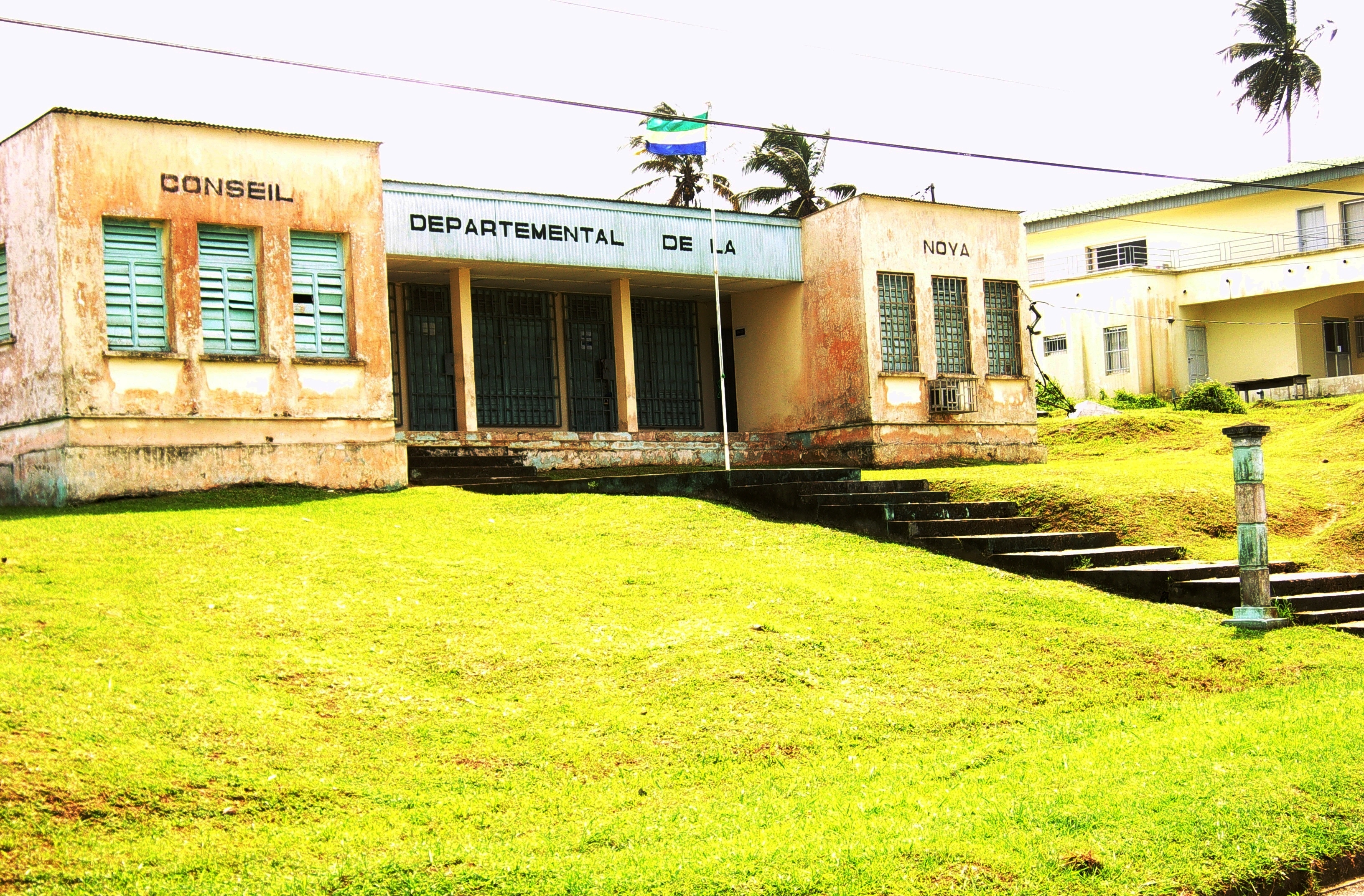 Cocobeach Gabon